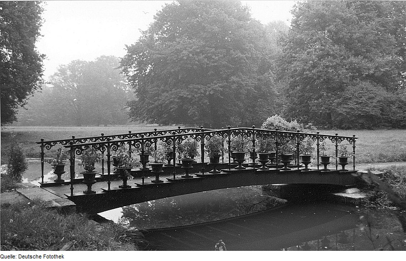 Original image description from the Deutsche FotothekBad Muskau. Fuchsienbrücke im Park Muskau (Erzeugnis der Eisenhütte Keula)